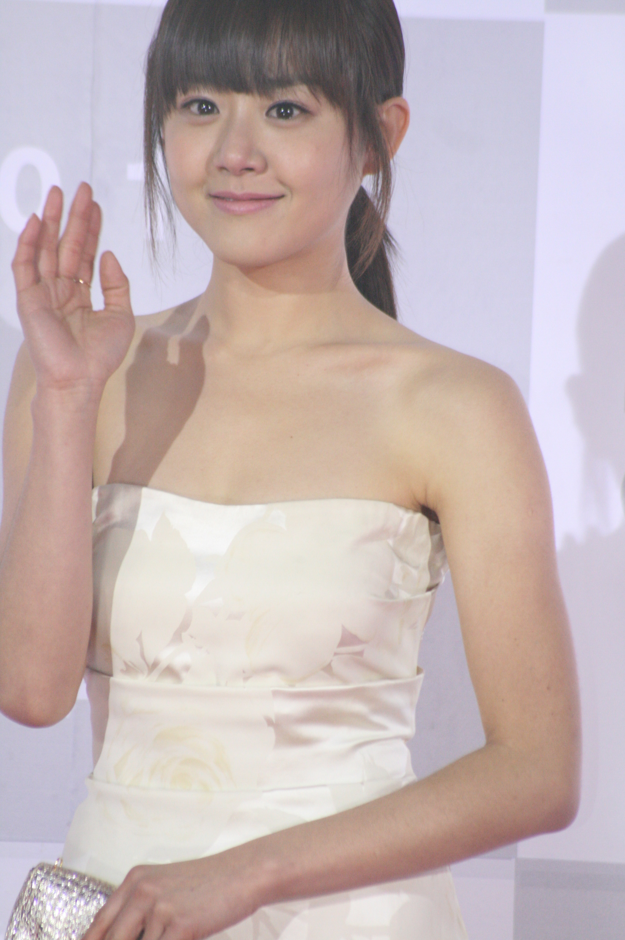 2010KBS연기대상 492